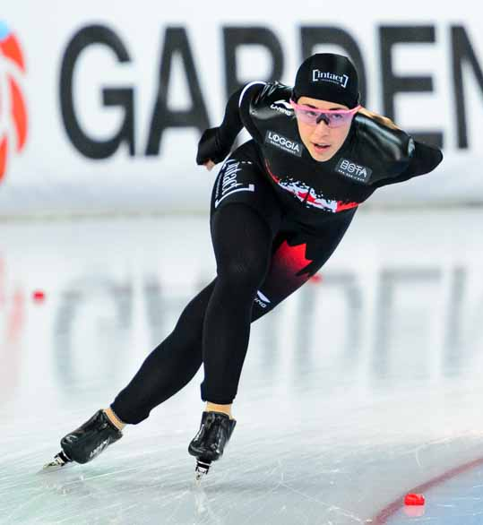 Speedskater